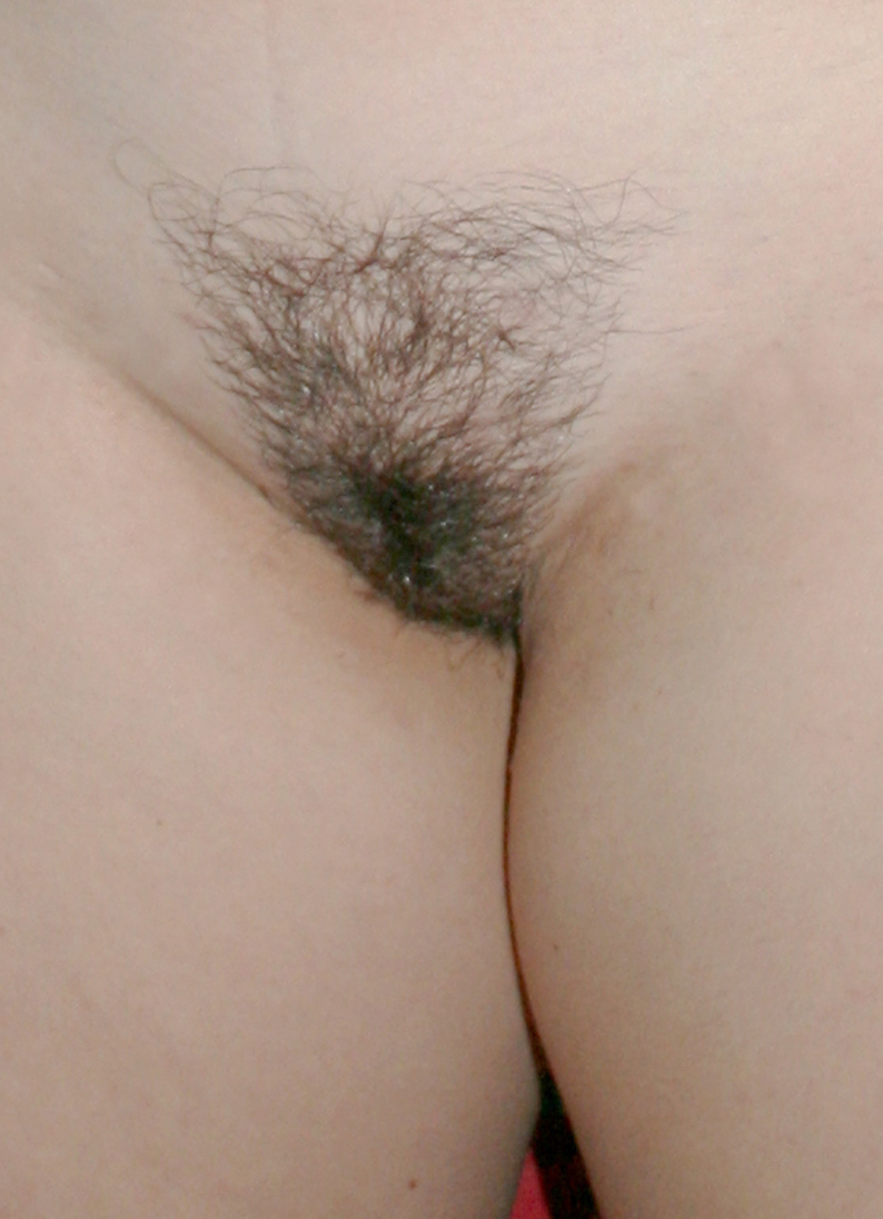 Entretien du pubis